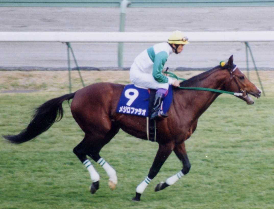 Mejiro Farao (horse)